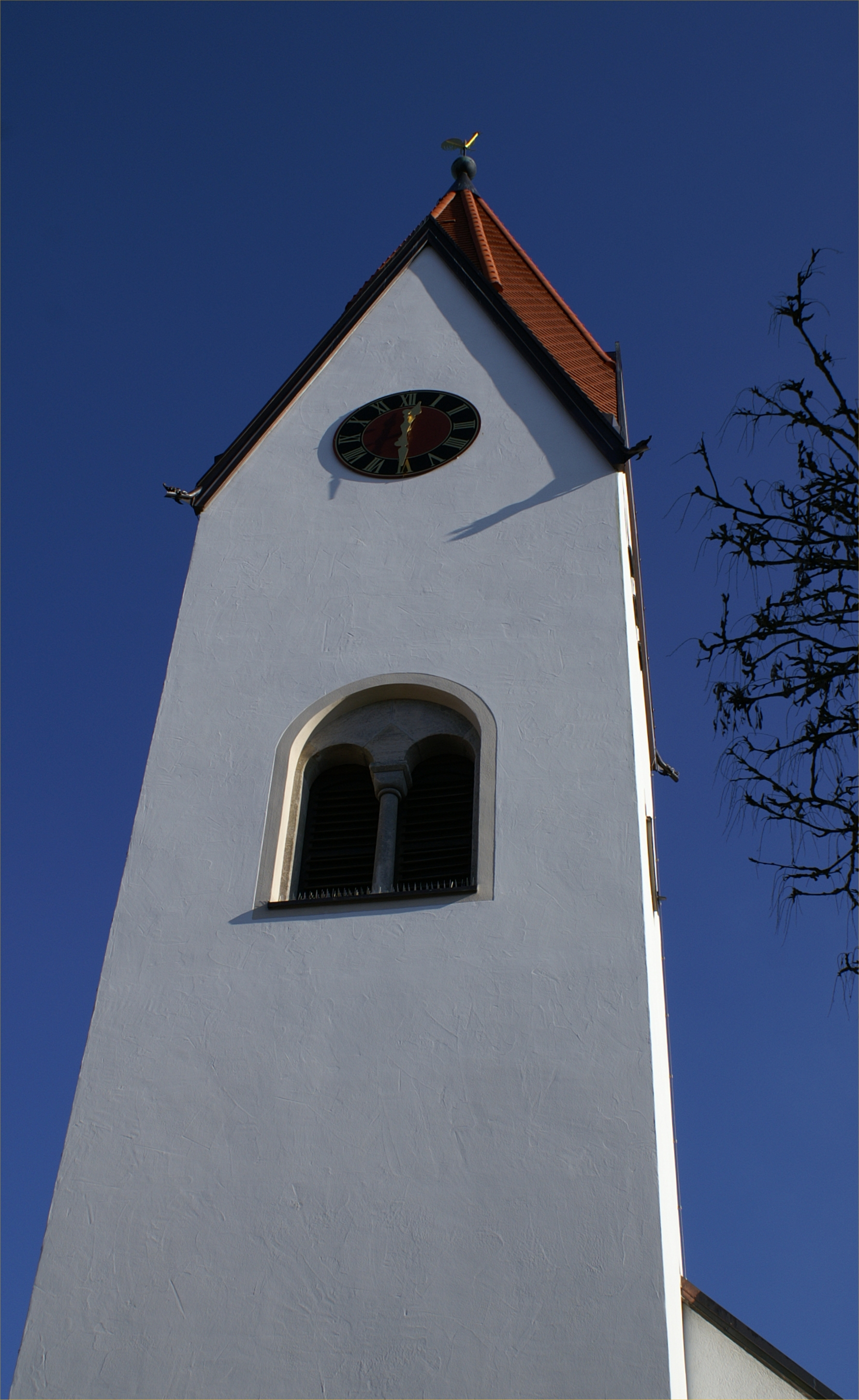 Turm der Martinskirche in Radelstetten im Alb-Donau-Kreis